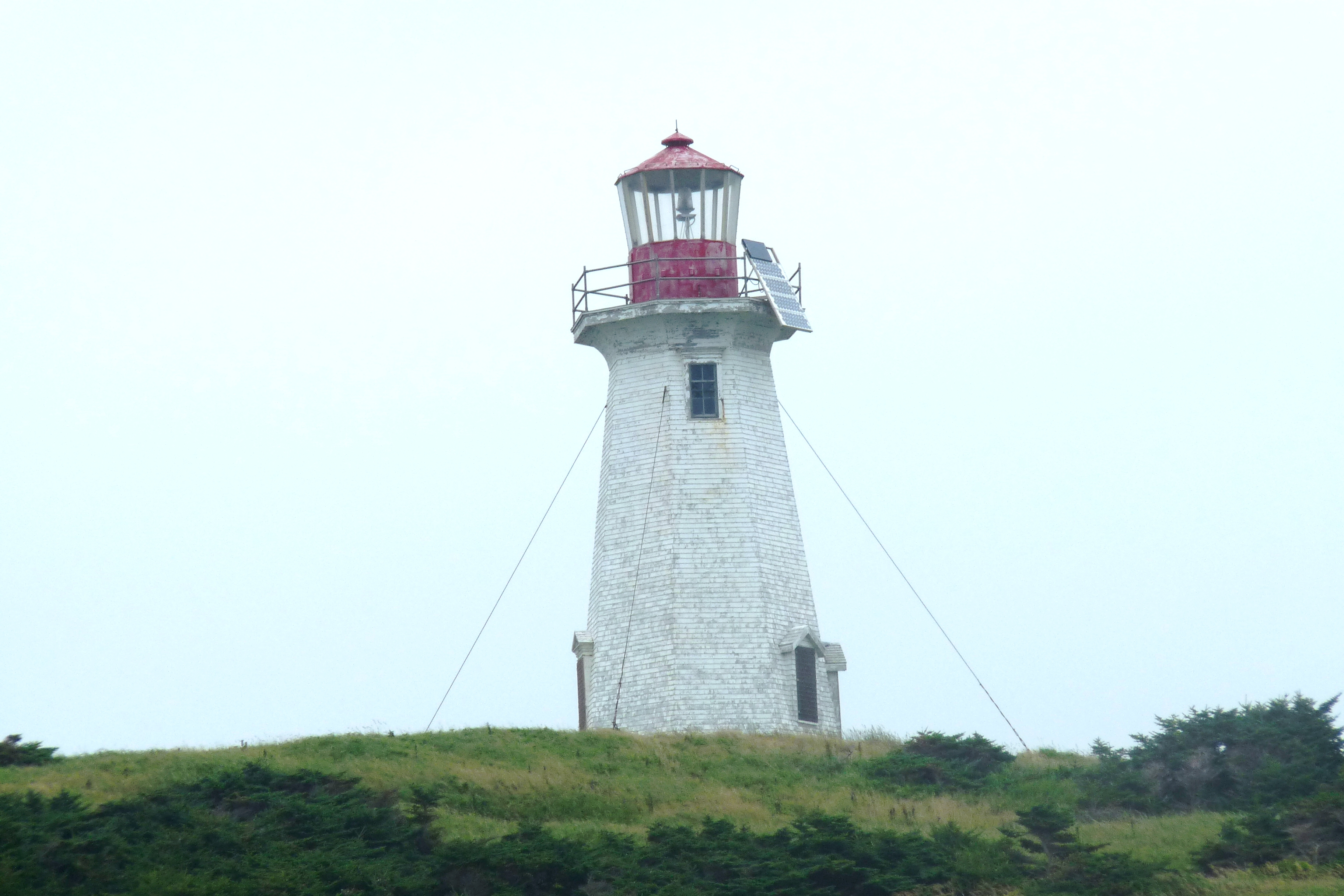 Phare de l'ile Brion en 2011